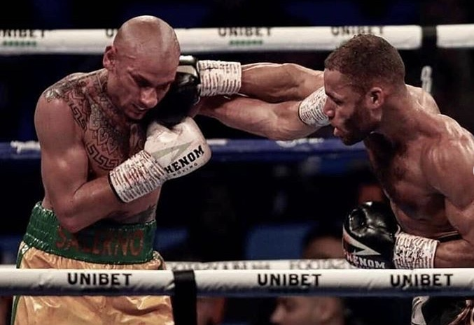 Dario Socci durante il match valevole per il Titolo IBF European dei Super Welterweight nel 2019